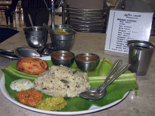 Nagercovil, India.